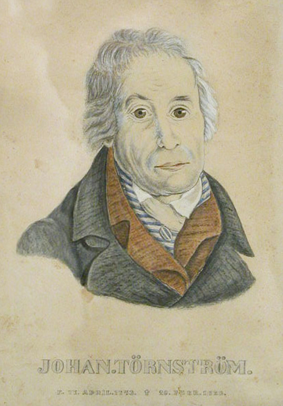 Akvarell föreställande galjonsbildhuggare Johan Törnström. Text på bilden: Johan Törnström. F 17 APRIL. 1743 D 20 FEBR. 1828. Baksidestext: Tillhör Johan Törnströms sonsonsdöttrar Ellen och Ruth Törnström.